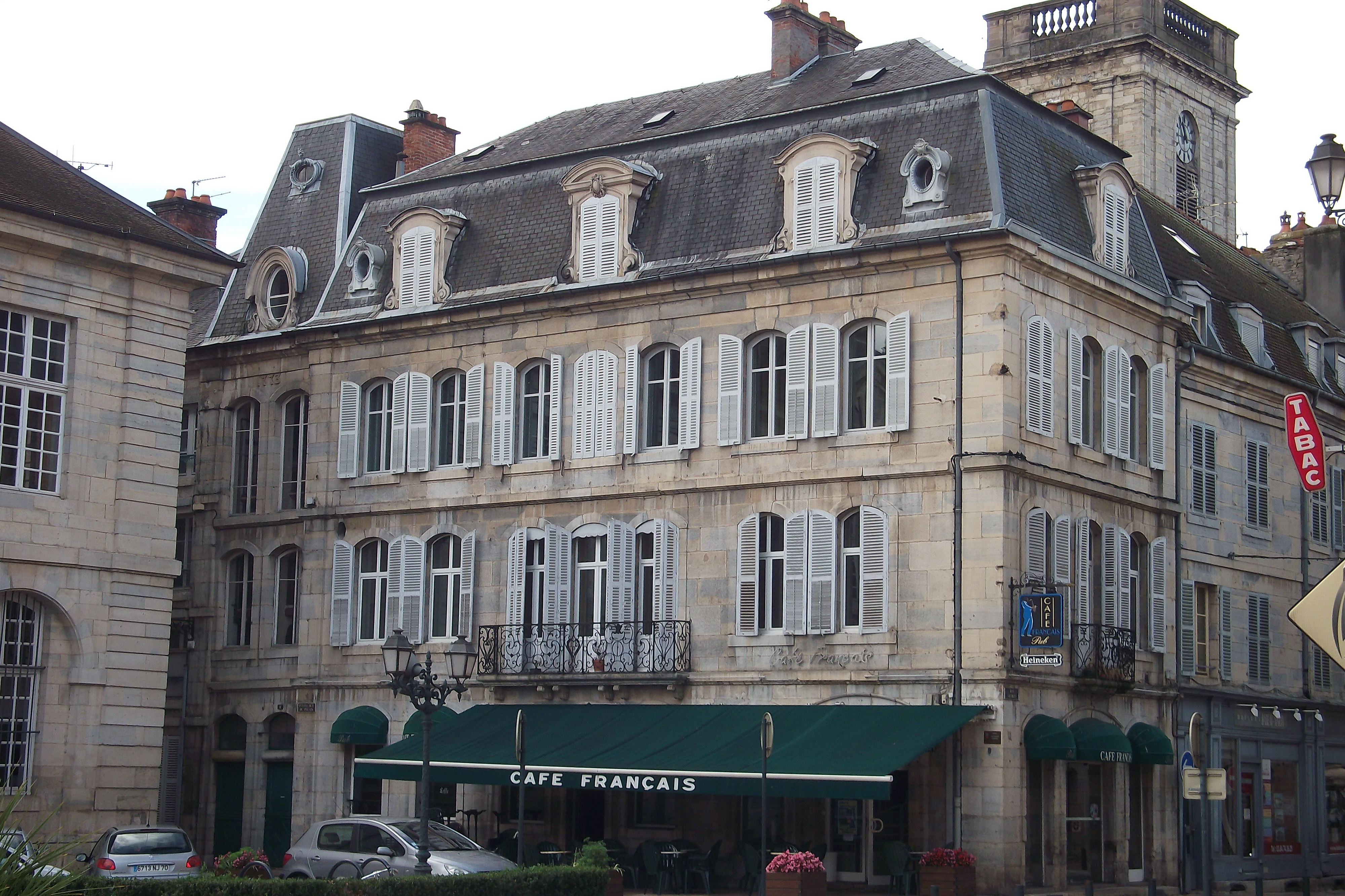 L'hôtel Pétremand de Vesoul (Haute-Saône, Franche-Comté)